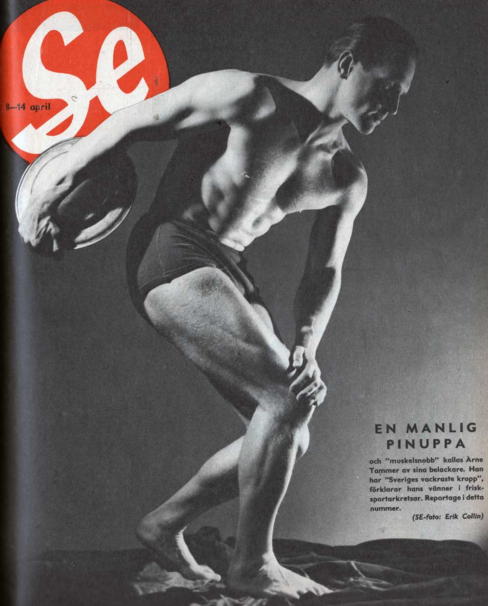 Arne Tammer (1913-2002)